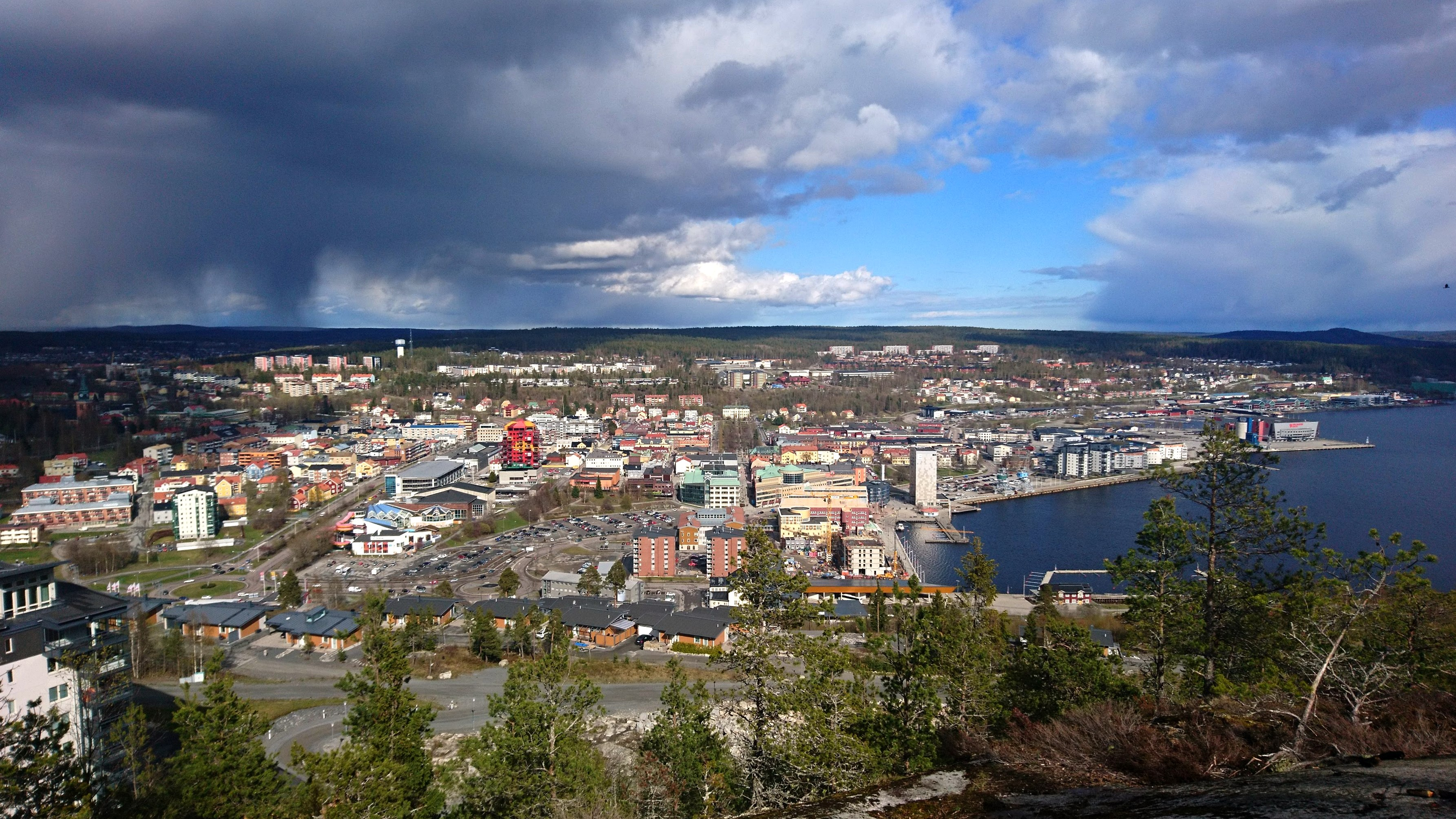 Utsikt över Örnsköldsvik från Varvsberget.